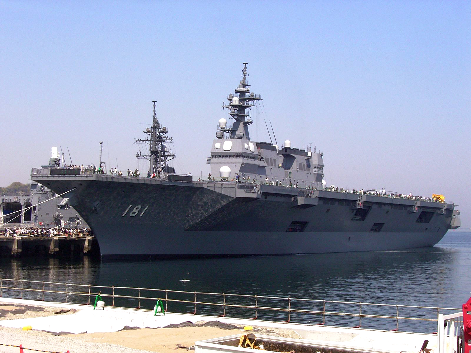 横須賀・吉倉桟橋で一般公開中の護衛艦ひゅうが。